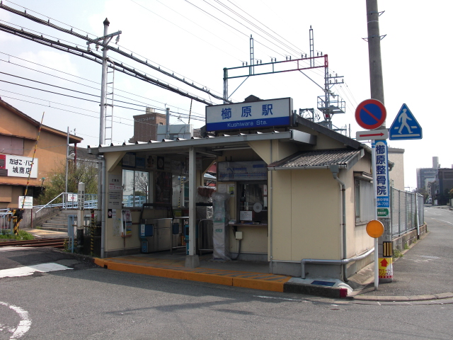 Kushiwara Station(櫛原駅)